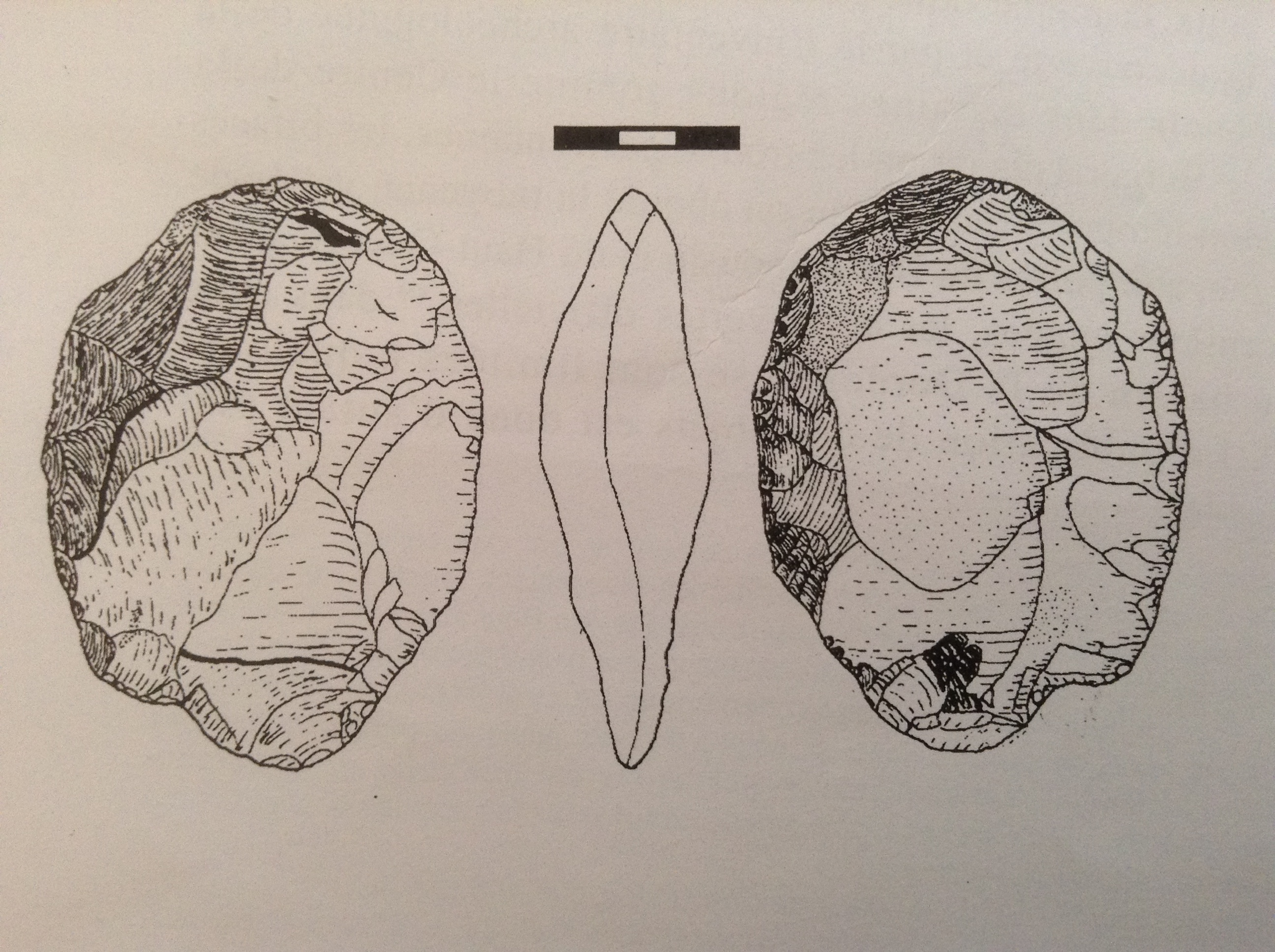 Vues recto, verso et profil du biface moustérien de tradition acheuléenne découvert en 1992 à Mayrac (Lot, France)